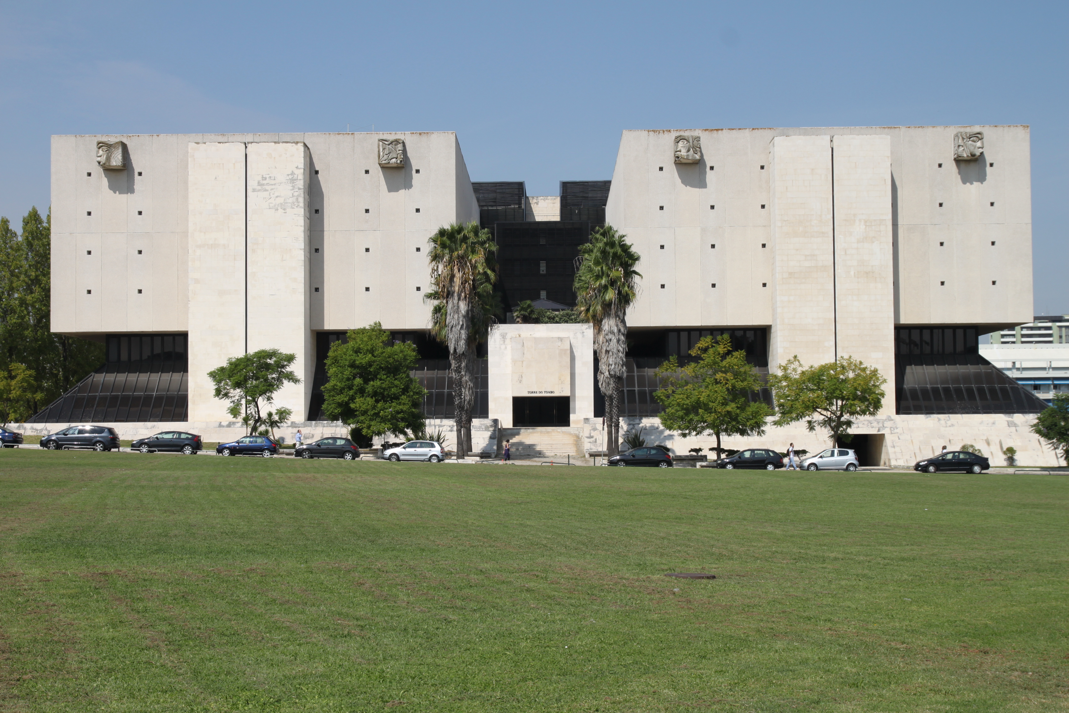 Torre do Tombo This file was uploaded for Wiki Loves Monuments in Portugal with the unique identifier 97014262.